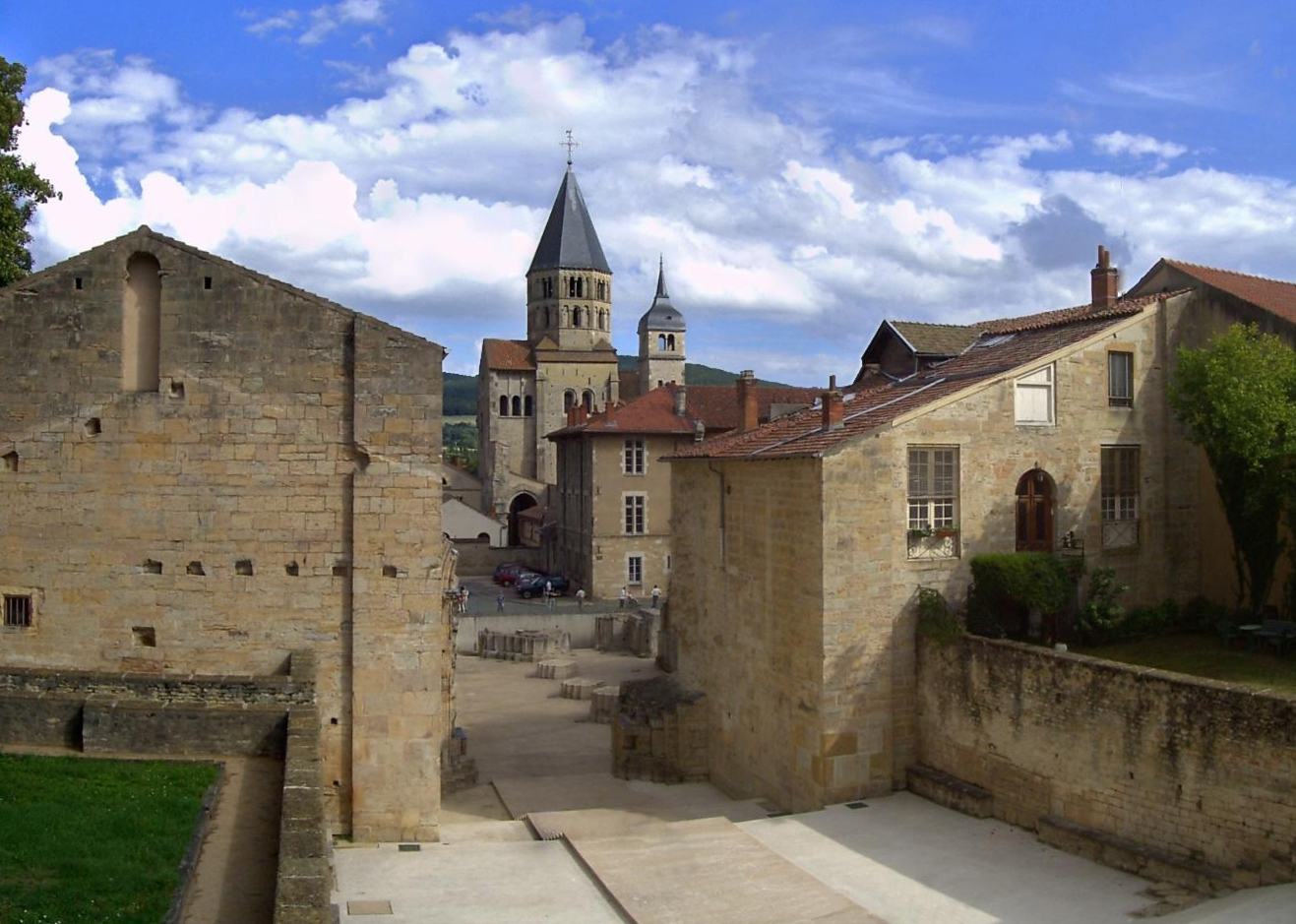 Cluny (Saône-et-Loire, Bourgogne, France) : Allée centrale de l'Abbaye de Cluny.